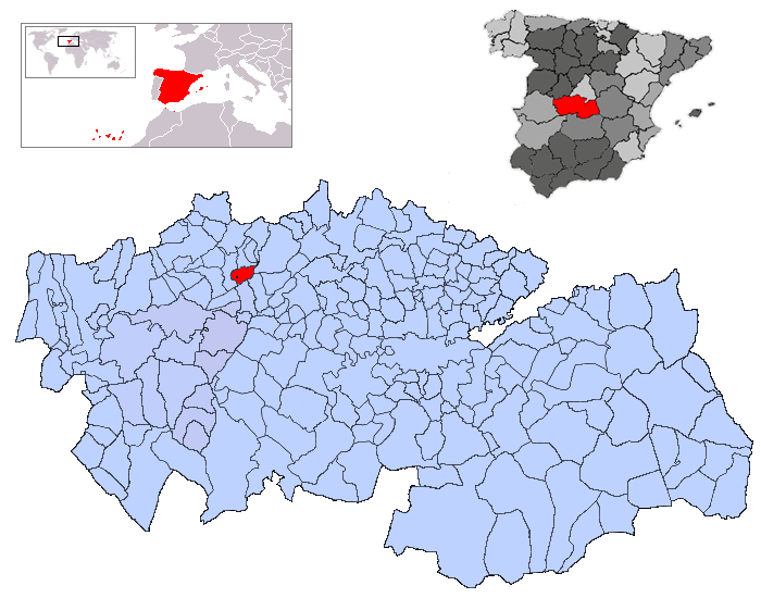 Cardiel de los Montes en la provincia de Toledo